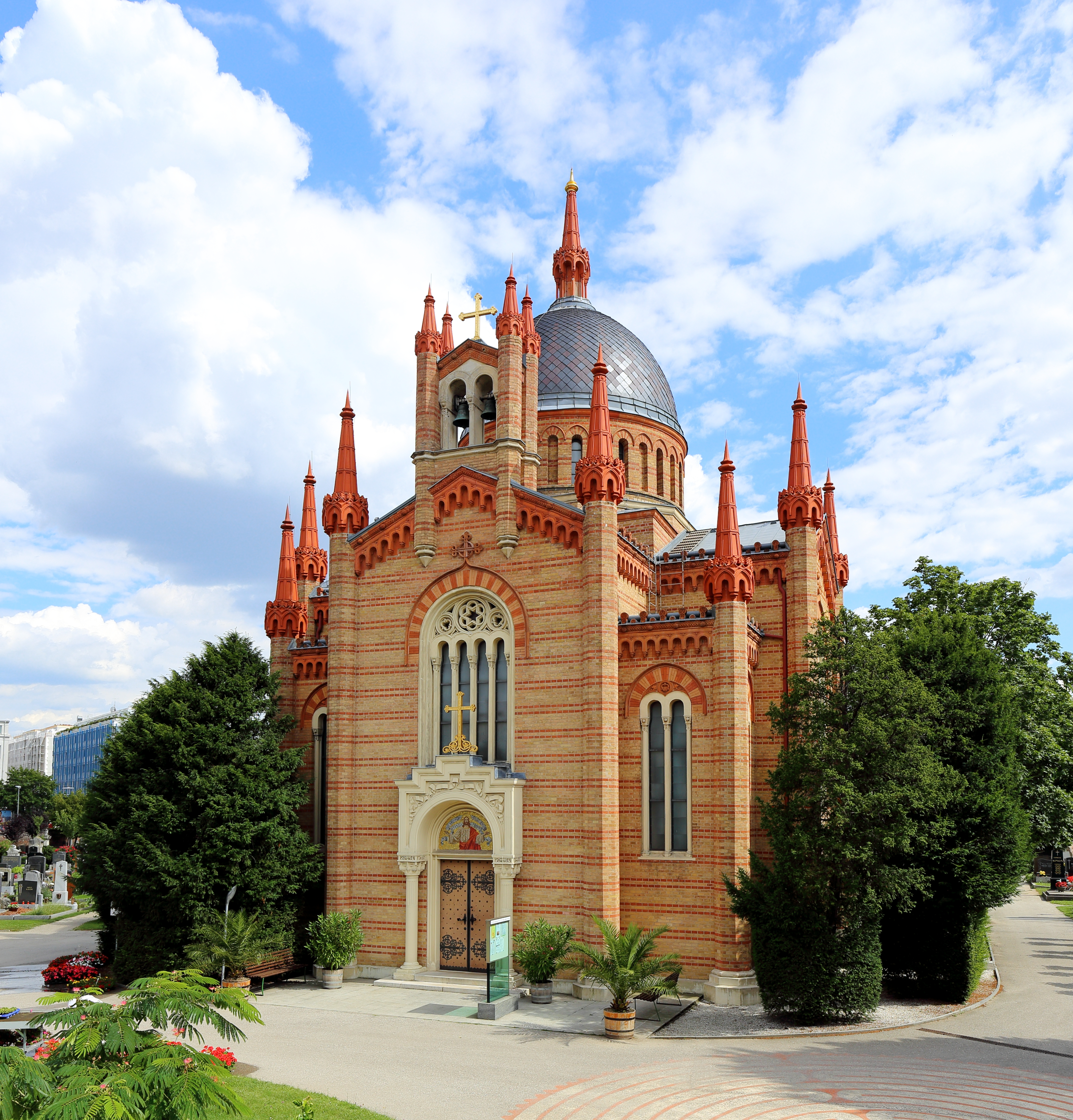 Nordwestansicht der Christuskirche am evangelischen Friedhof Matzleinsdorf im 10. Wiener Gemeindebezirk Favoriten.Sie wurde als Friedhofskapelle von 1858 bis 1860 in byzantinischer Stilart als Ziegelrohbau mit Kuppel über dem Grundriss eines griechischen Kreuzes nach Plänen von Theophil von Hansen errichtet. Im Jahr 1899 wurde sie eine Predigtstation und zu diesem Zwecke baute man eine Empore, Kanzel und Altar ein. Nachdem im Jahr 1924 die Predigtstation zu der selbständigen Pfarrgemeinde Wien-Favoriten erhoben wurde, hat die Kirche jetzt den Status einer Pfarrkirche.